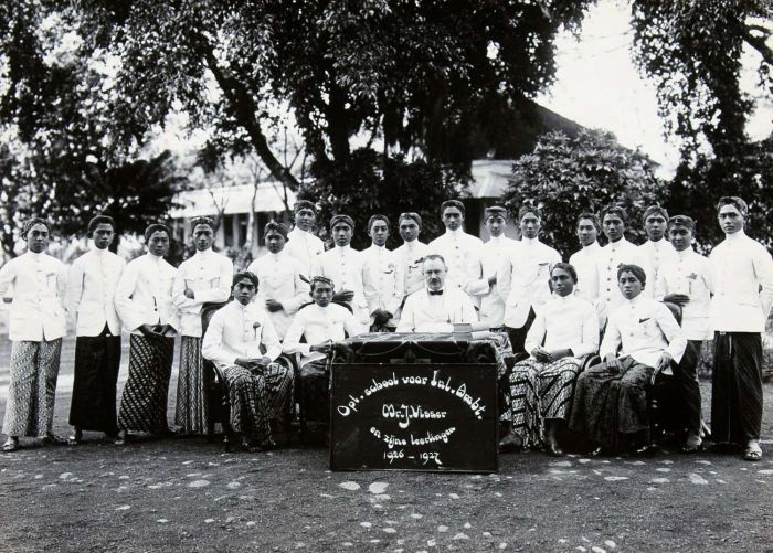 Foto. Groepsportret van Mr. J. Visser met leerlingen van de Opleidingsschool voor Inlandse Ambtenaren (OSVIA)